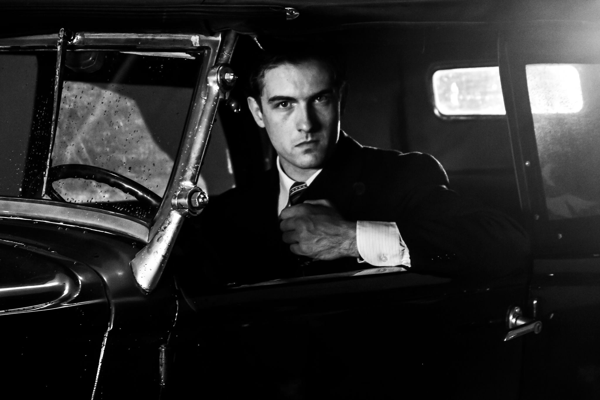 l'attore Mattia Zàccaro Garau sul set del film Il pretore.